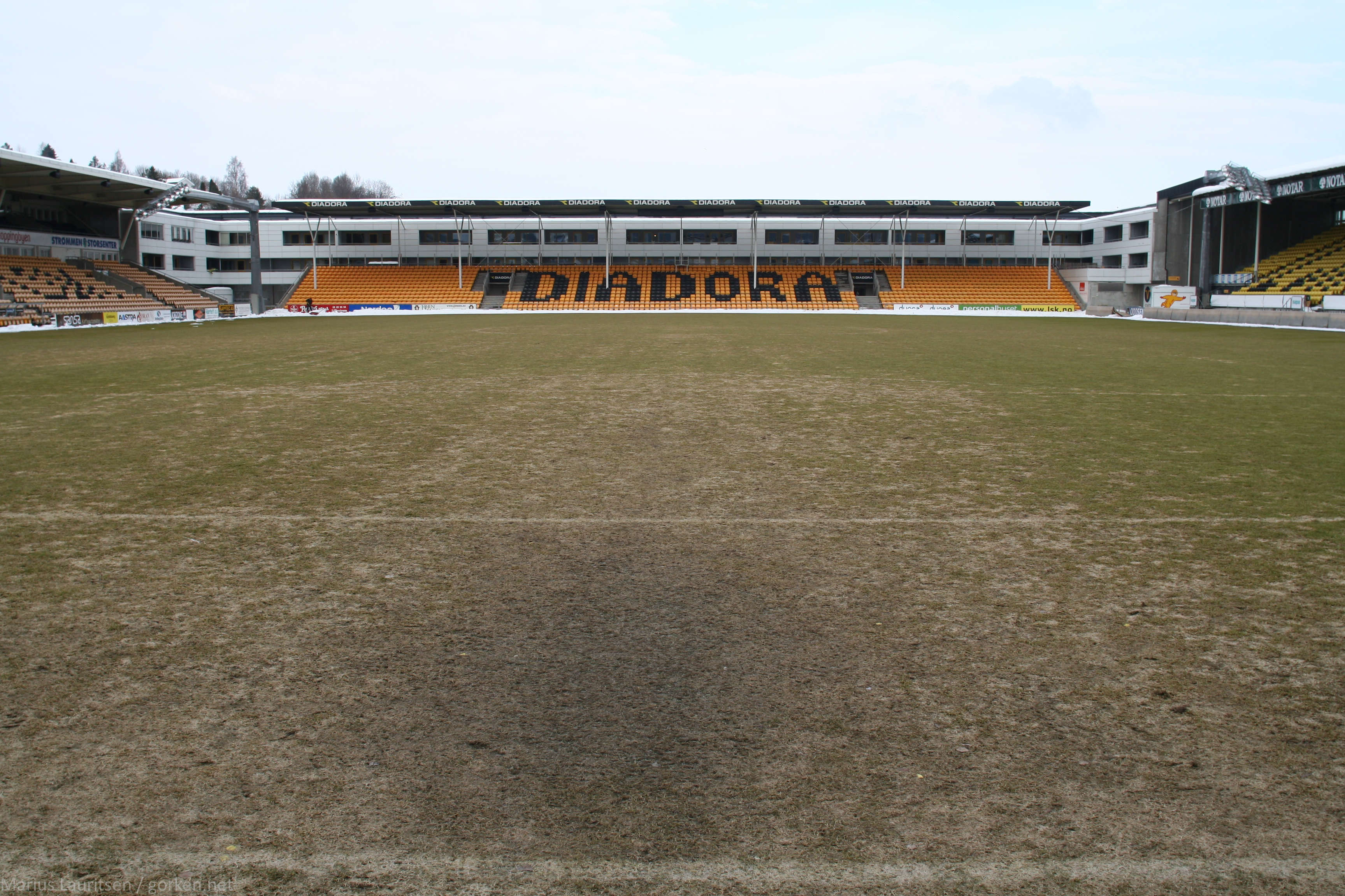 Åråsengresset 4. mars 2009